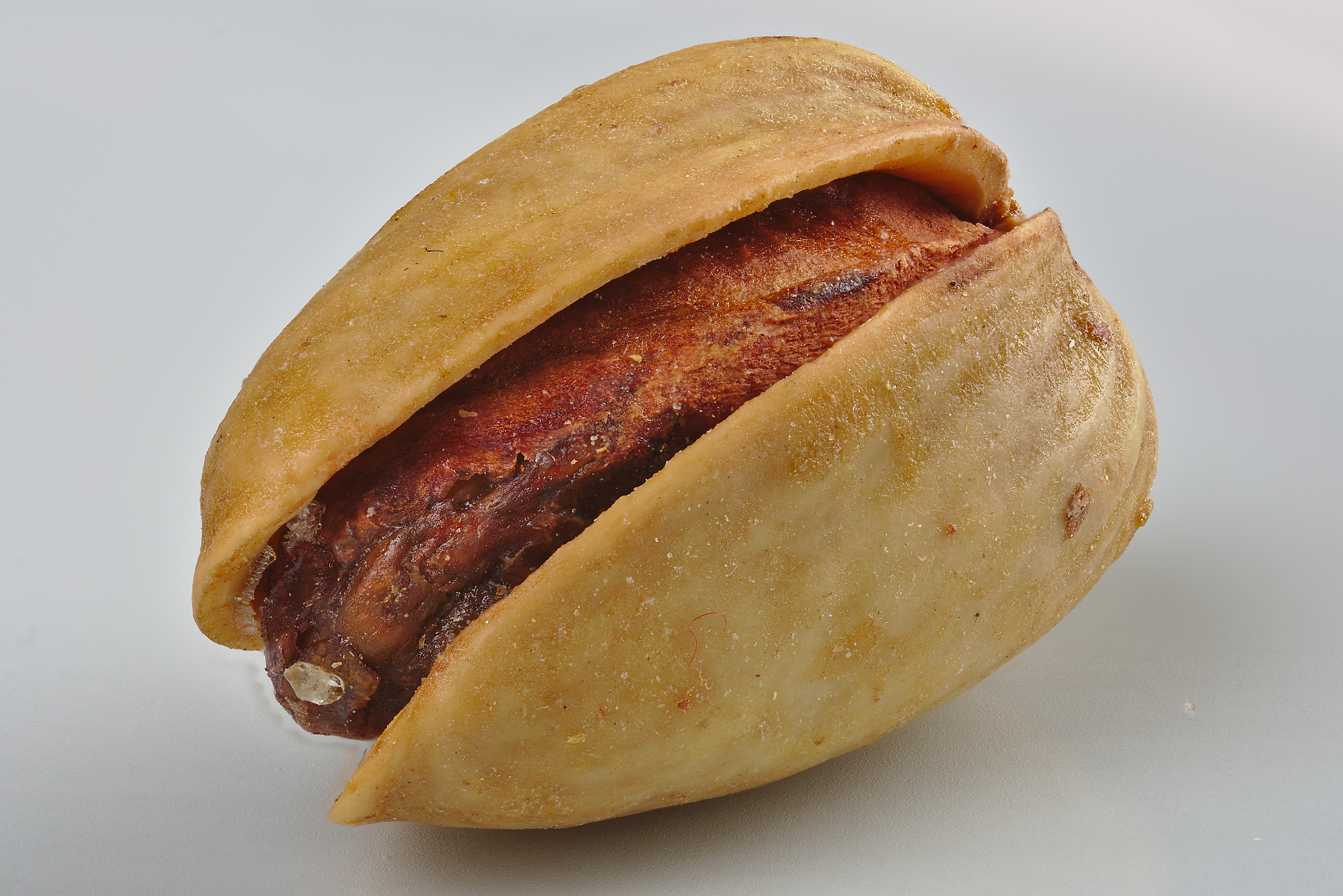 Eine Pistazie beim WikiDienstag am 30.5.2017 mit dem Cognisys Stackshot 3X fotografiert